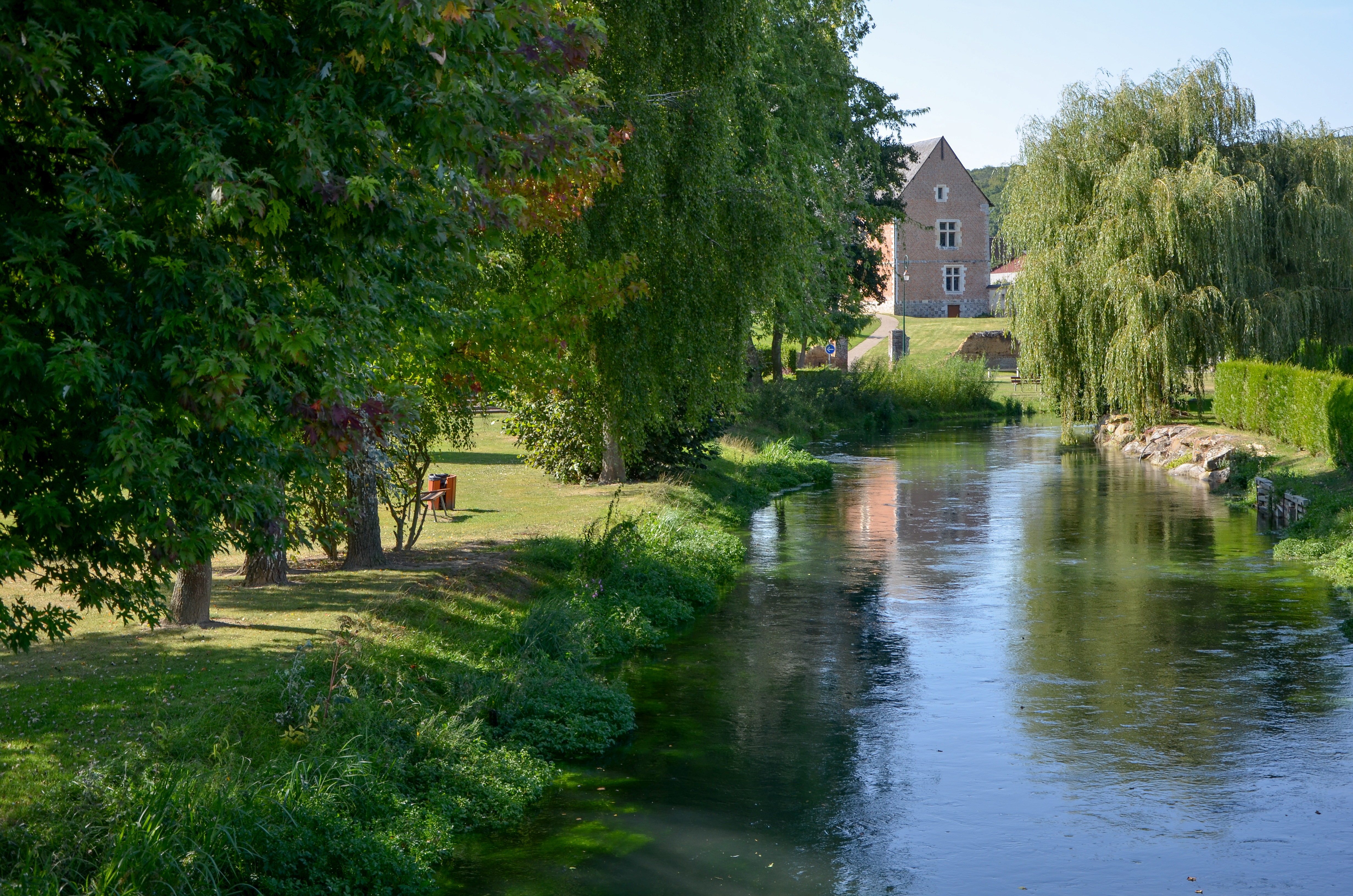 L'Andelle a Perriers-sur-Andelle, Eure, Normandie, France